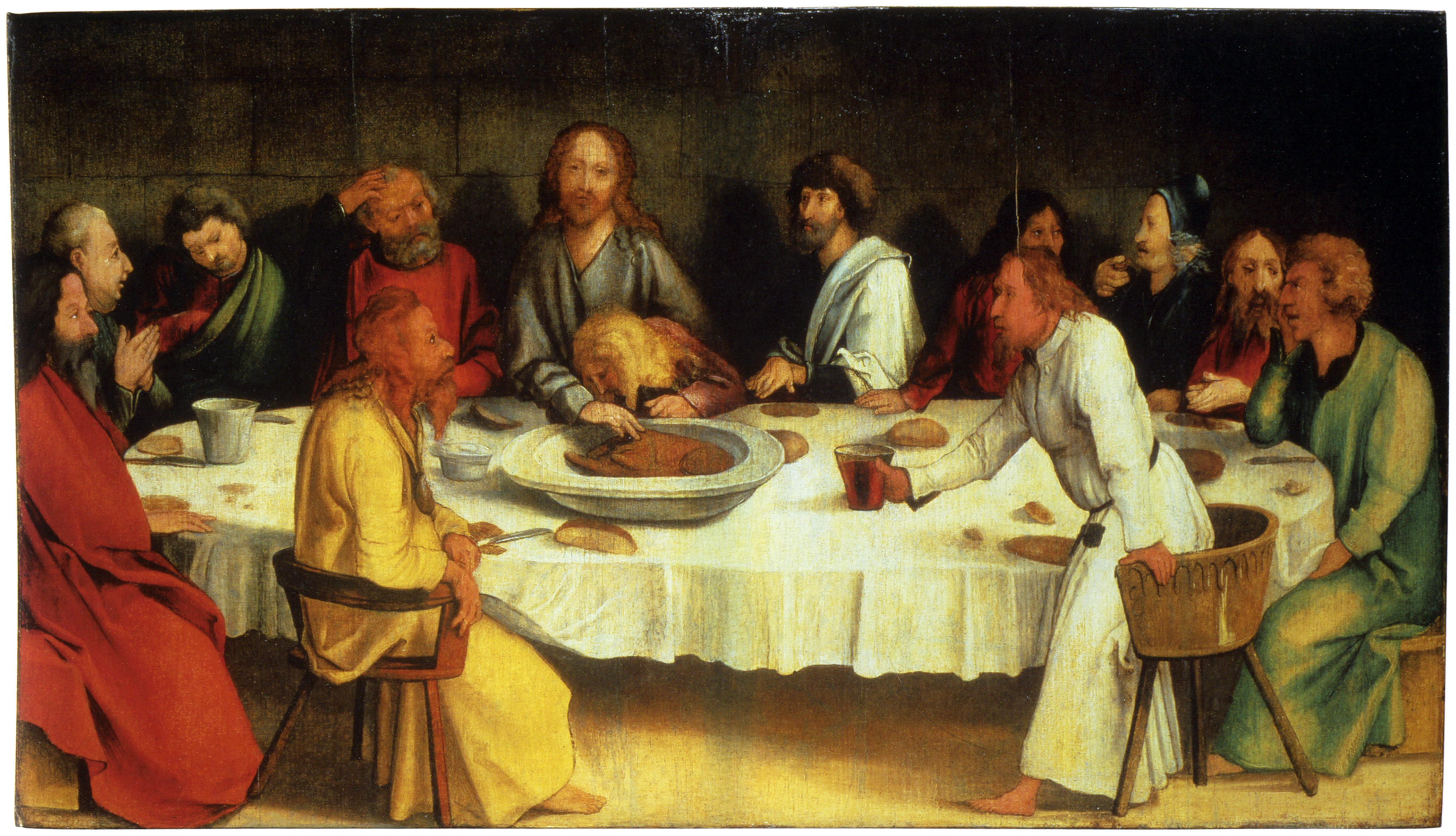 Outside: Last Supper